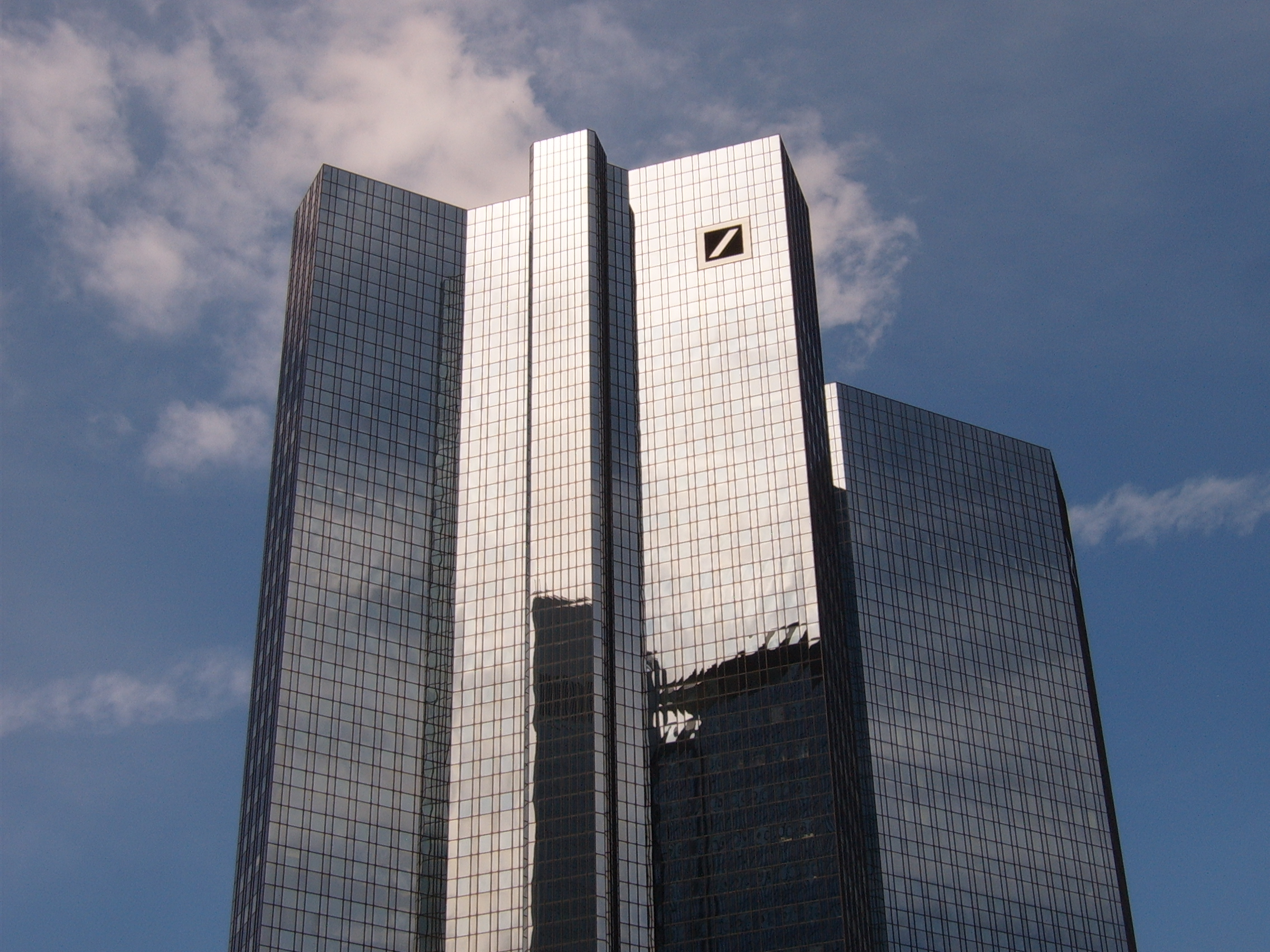 Deutsche Bank Twin Towers, Frankfurt am Main (Germany)